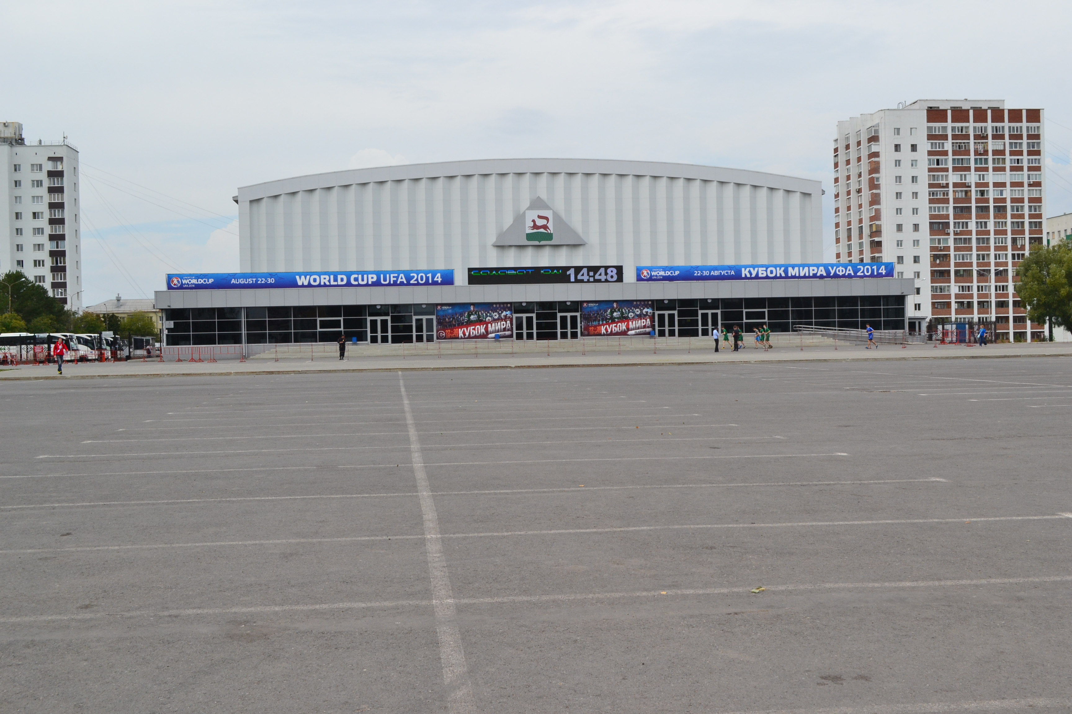 Кубок Мира среди молодёжных клубных команд 2014